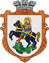 Герб села Білий Камінь